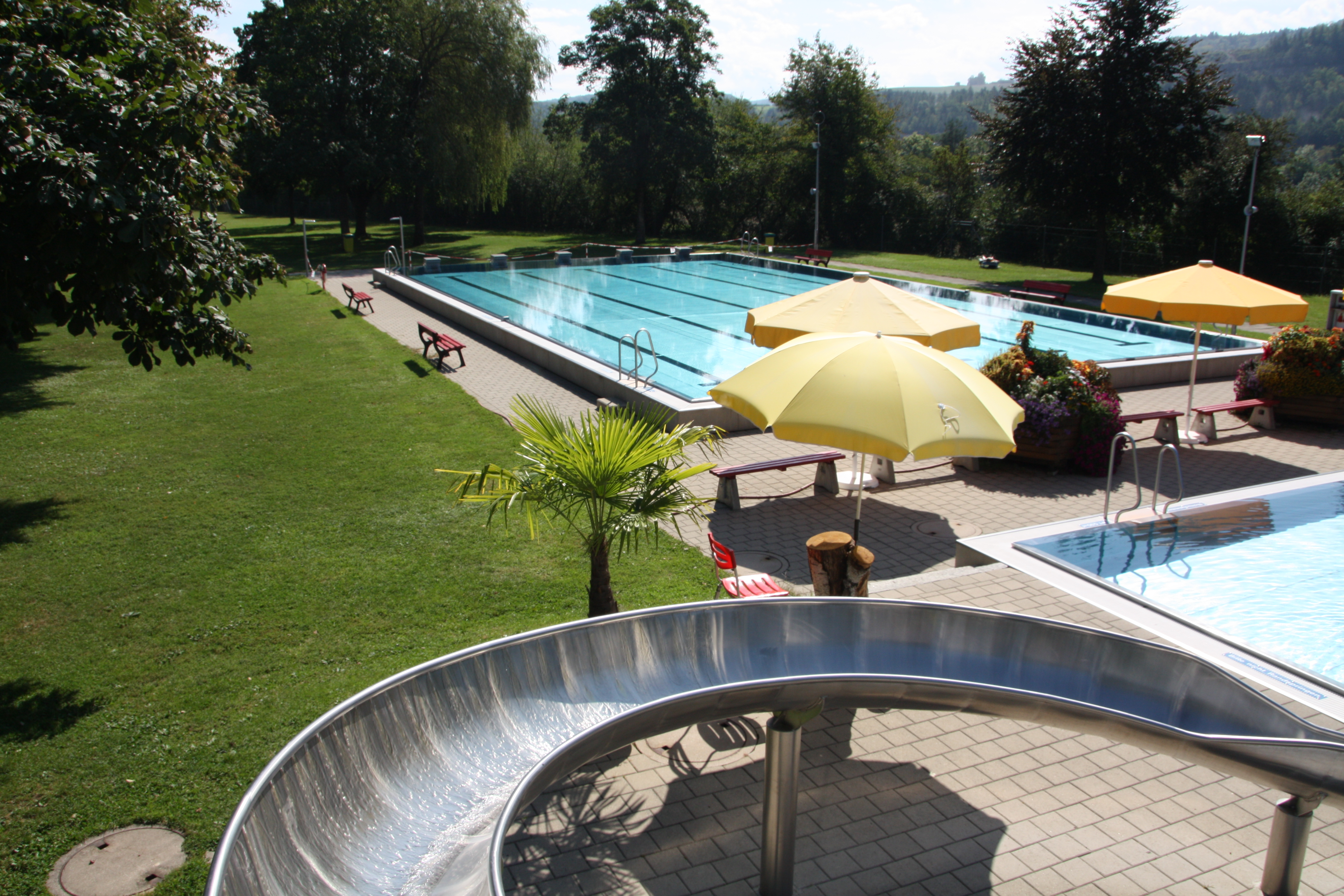 Ortschaft Reckingen, Ortsteil der Gemeinde Küssaberg im Landkreis Waldshut in Baden-Württemberg. Das Freibad.